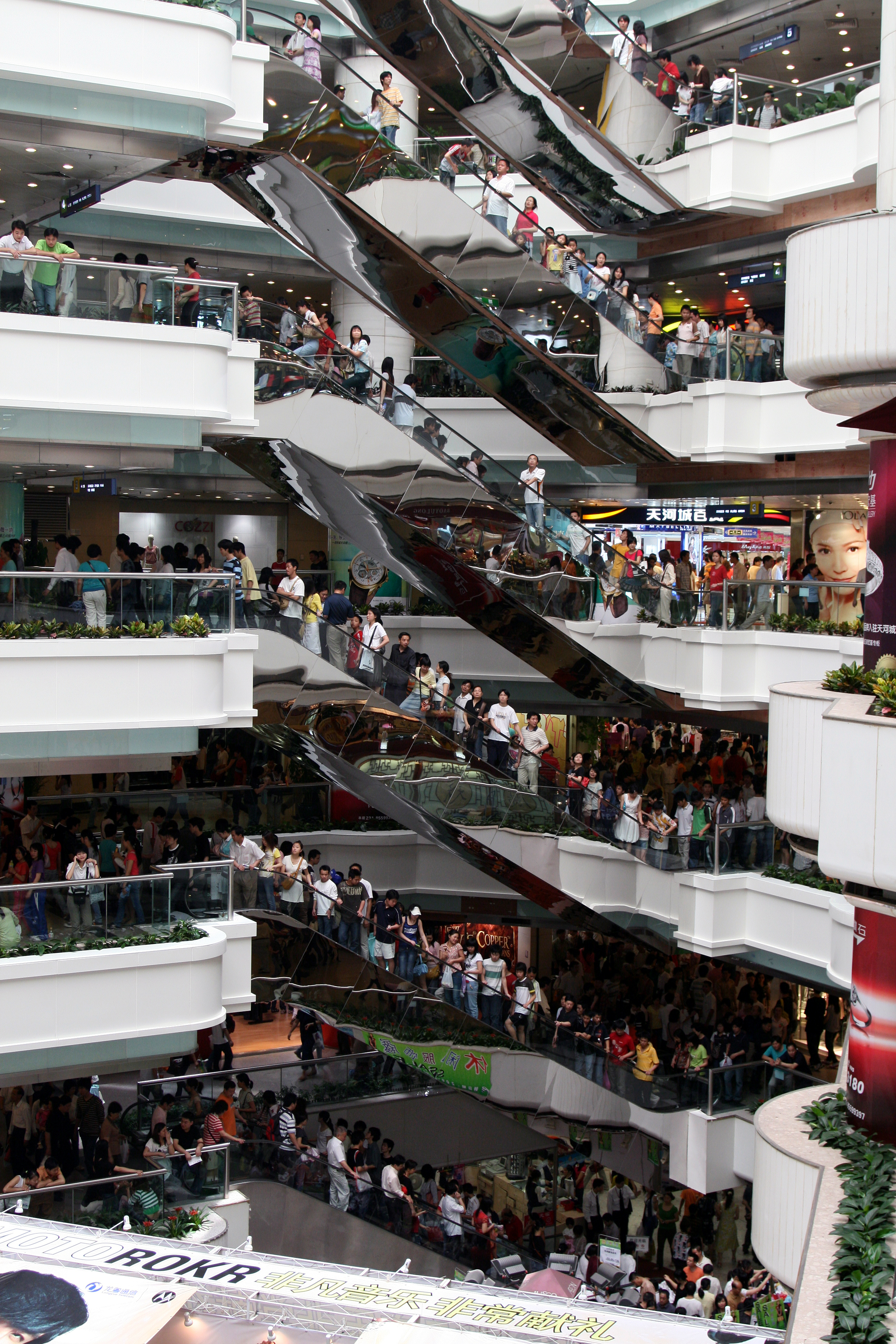 中文（中国大陆）: 天河城在五一黄金周